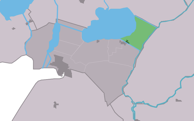 Kaartsje fan himrik fan Dolsterhuzen